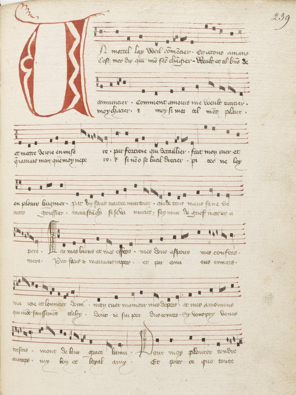 Paris, Bibliothèque Nationale, fonds français 1585